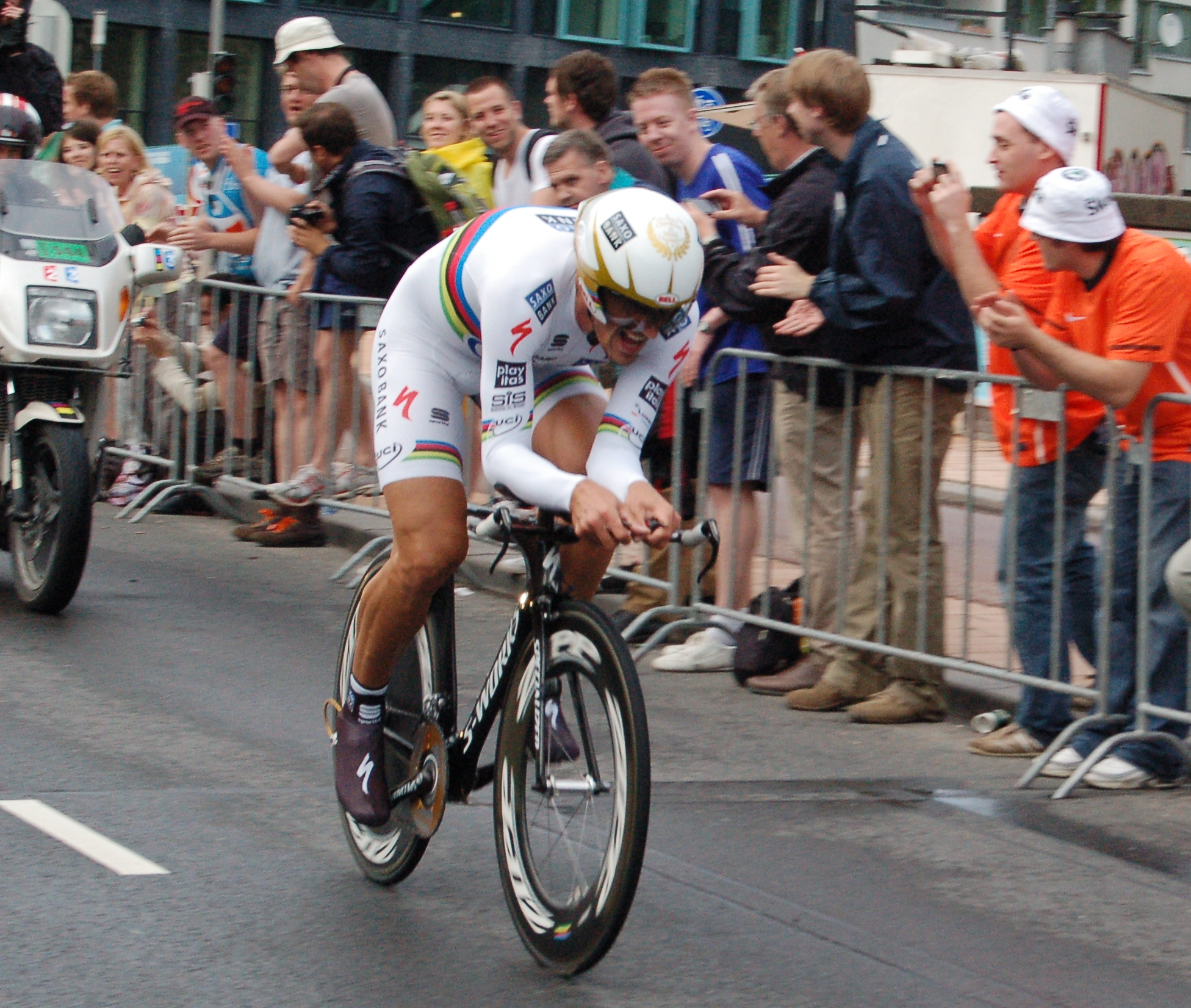 Prologue du Tour de France 2010 à Rotterdam - Fabian Cancellara